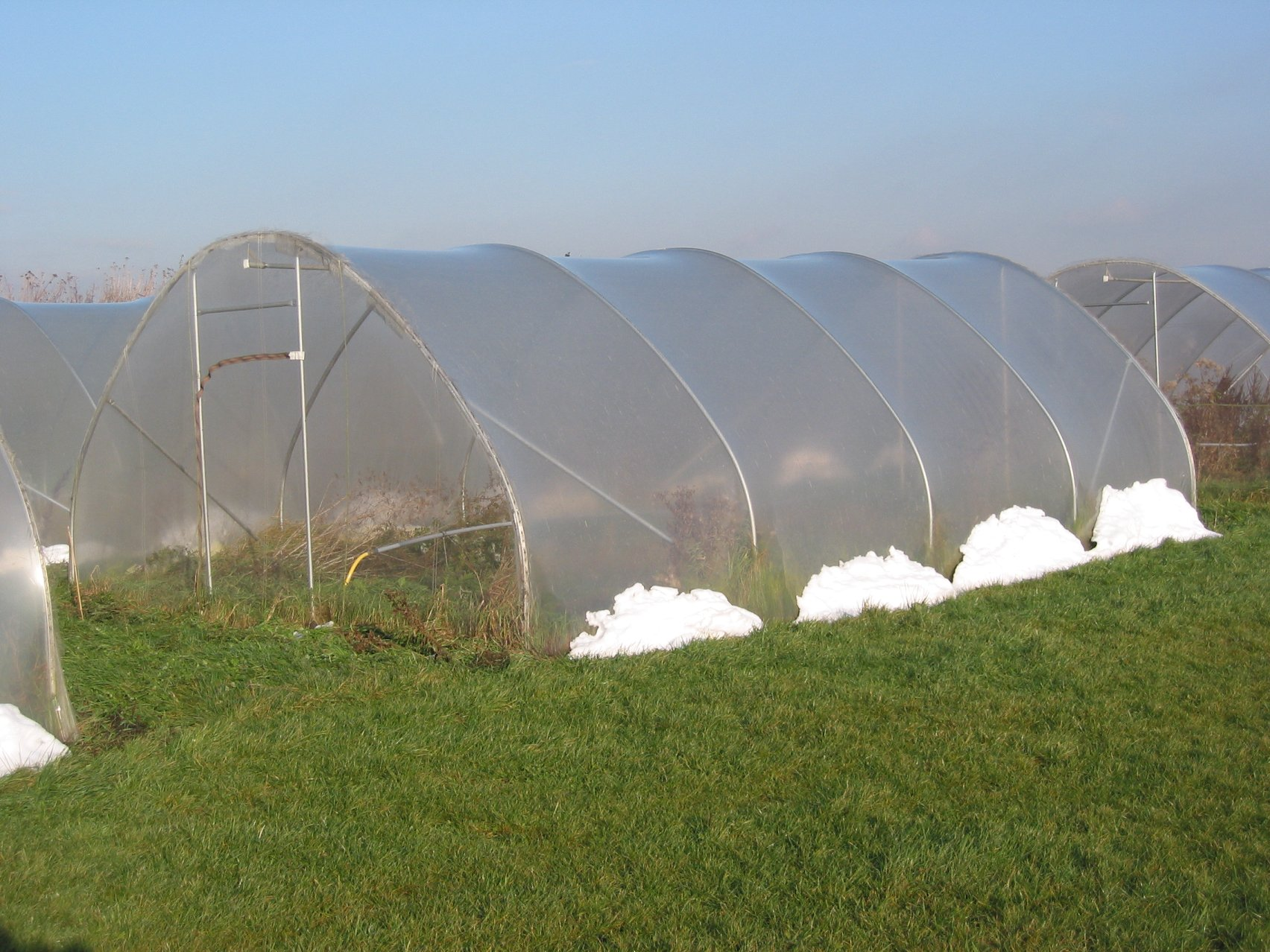 plastic tunnel Picture taken by myself